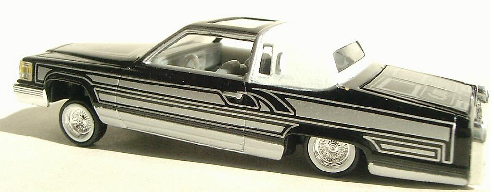 Een lowrider op basis van een Cadillac uit nl:1981.